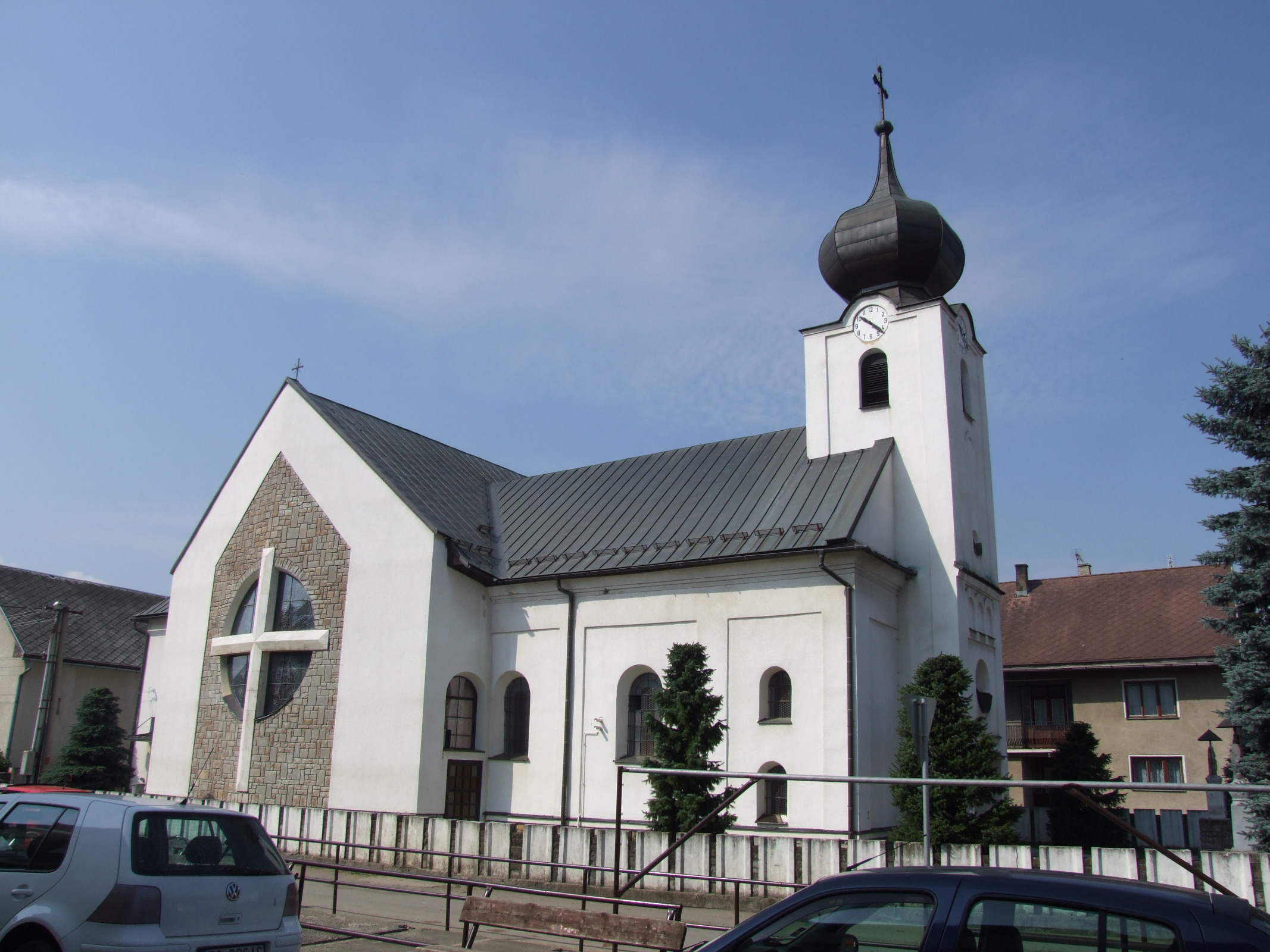 Suchá Hora church